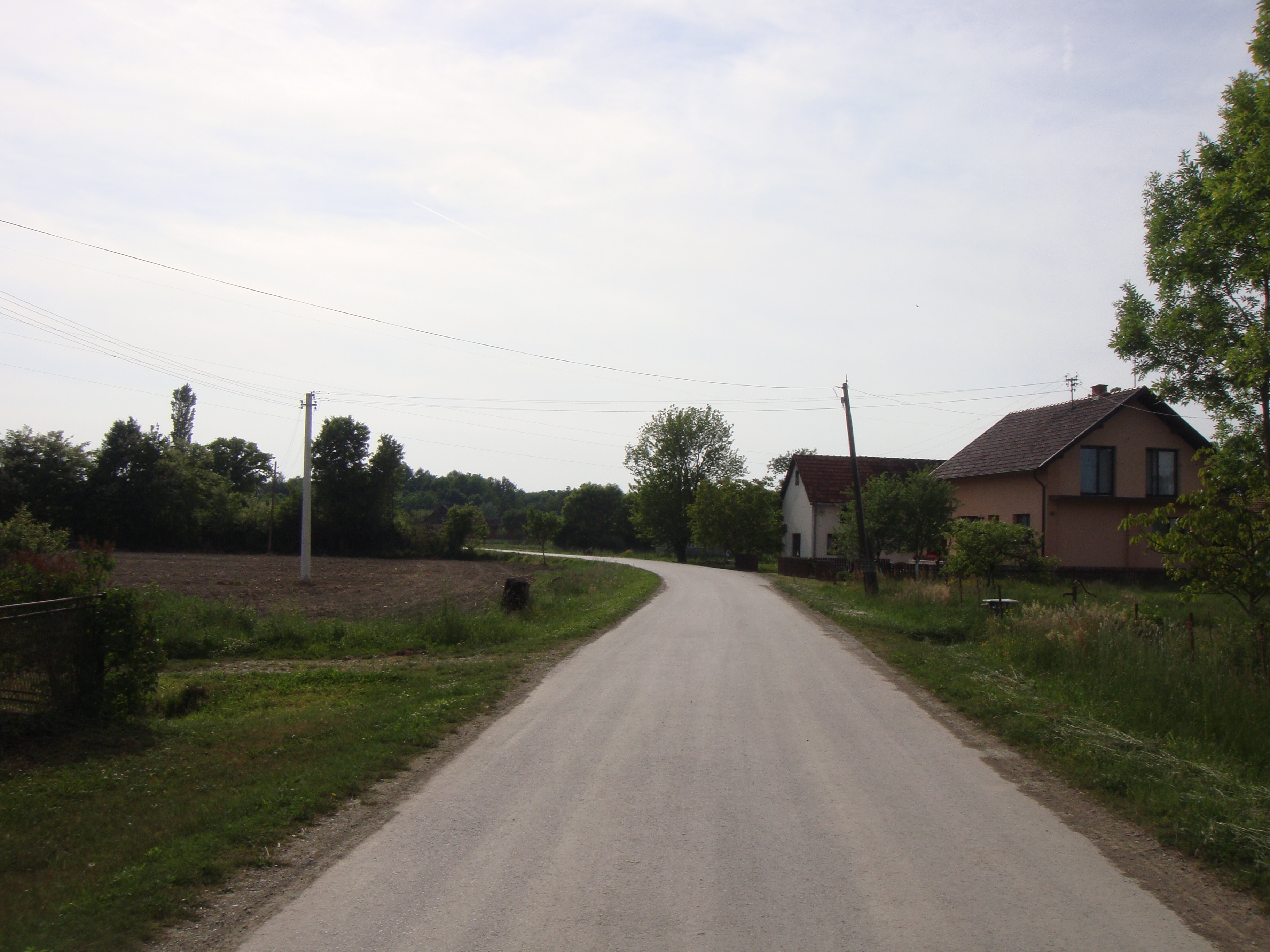 Batkusa moj raj